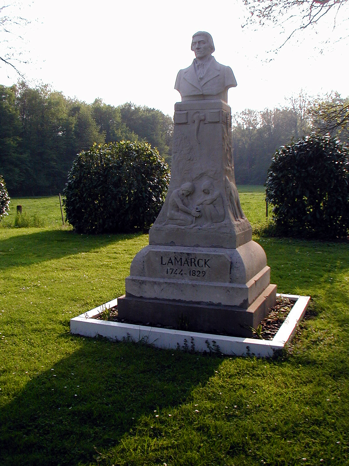 Bazentin (Somme, Picardie, France)